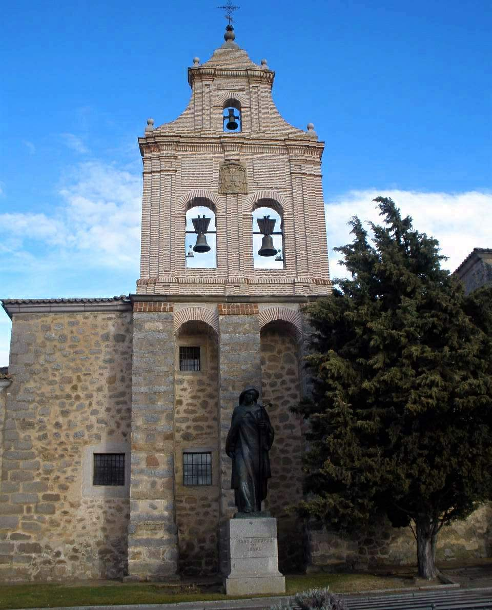 Monastery of the Encarnación, Ávila